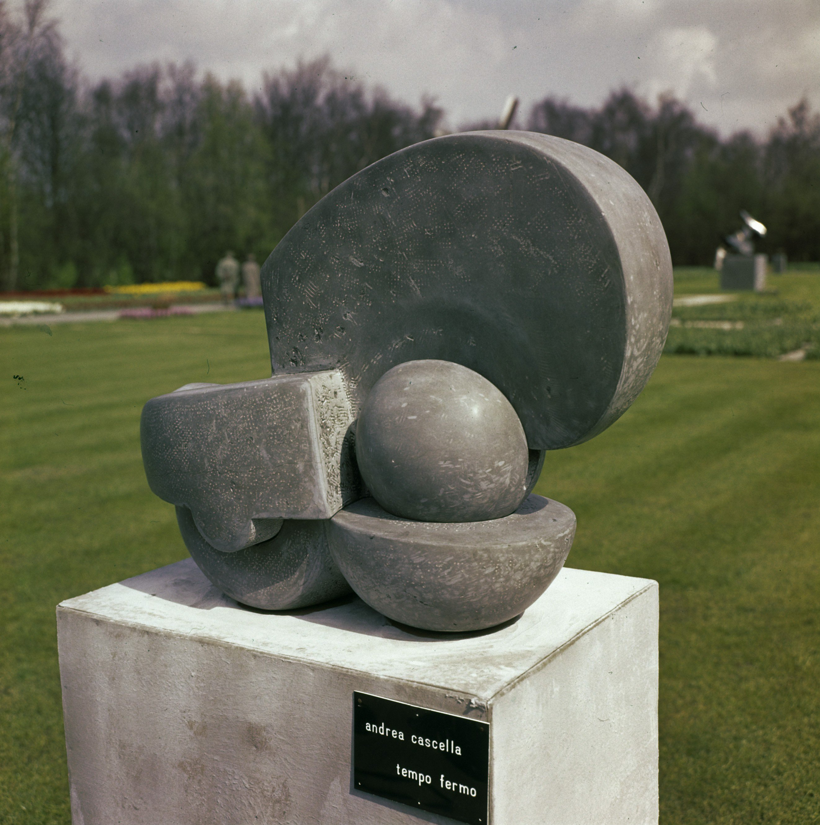 Collectie / Archief : Fotocollectie Anefo Reportage / Serie : [ onbekend ] Beschrijving : In steen uitgevoerd figuur van de beeldhouwster Andrea Cascella "Tempo Fermo"; nr. 11 "Nauta" van Francesco Somaini in ijzer; nr. 12 Vrouwenfiguur van Nico Jonk Datum : 20 april 1964 Locatie : Lisse Trefwoorden : beelden Instellingsnaam : Keukenhof Fotograaf : Nijs, Jac. de / Anefo Auteursrechthebbende : Nationaal Archief Materiaalsoort : Dia (kleur) Nummer archiefinventaris : bekijk toegang 2.24.01.07 Bestanddeelnummer : 254-7162